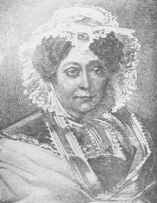 জোহনা হেনরিয়েটি লিওপোলডিনি কুসলার